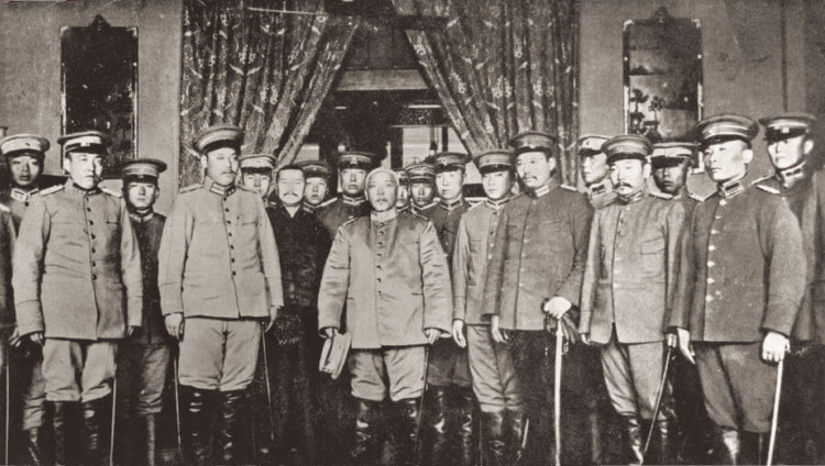 清帝退位后，1912年3月10日，袁世凯在北京就任中华民国第二任临时大总统后，和僚属在北京外交部合影。